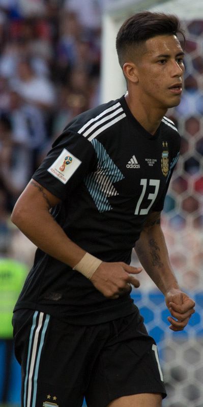 Месси и Ко не смогли обыграть неуступчивых исландцев